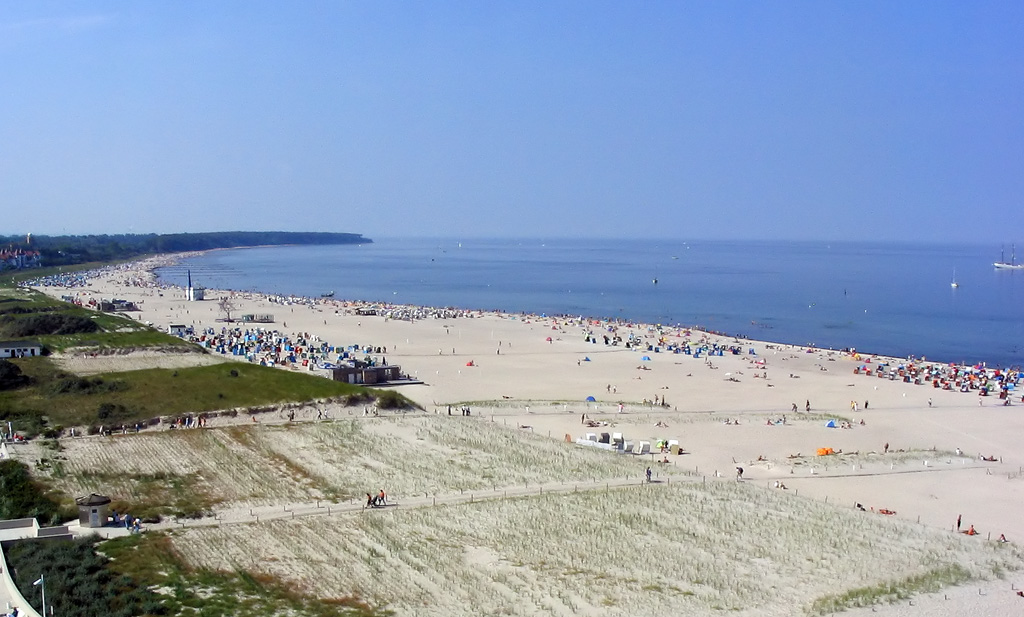 Beschreibung: Warnemünde Strand Fotograf: Darkone, 5. September 2004